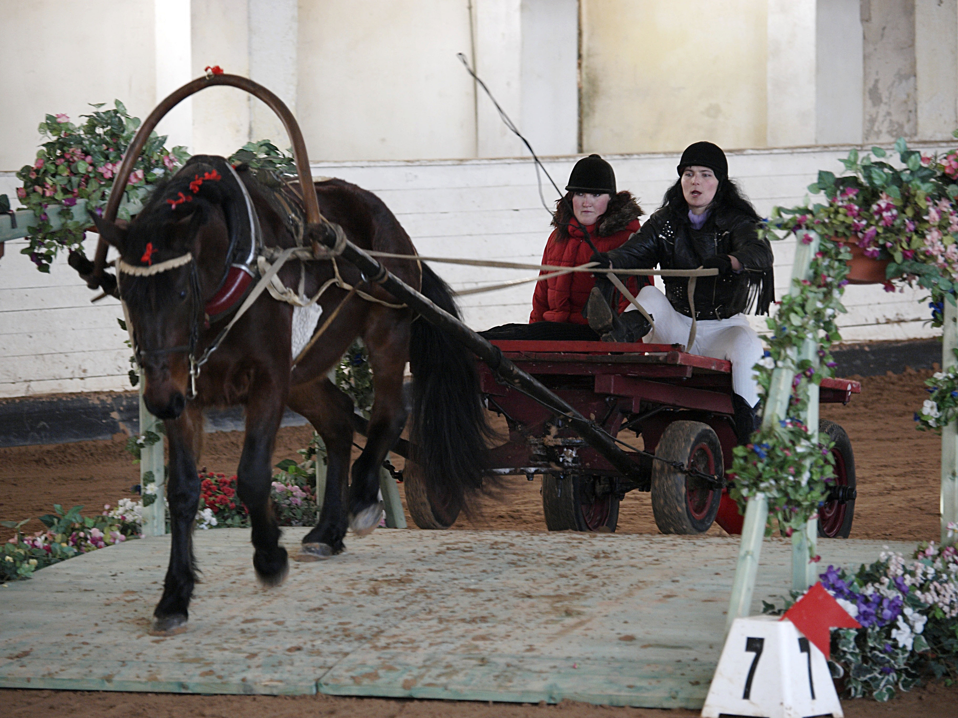 Sport centre KLEISTI, Riga, Latvia